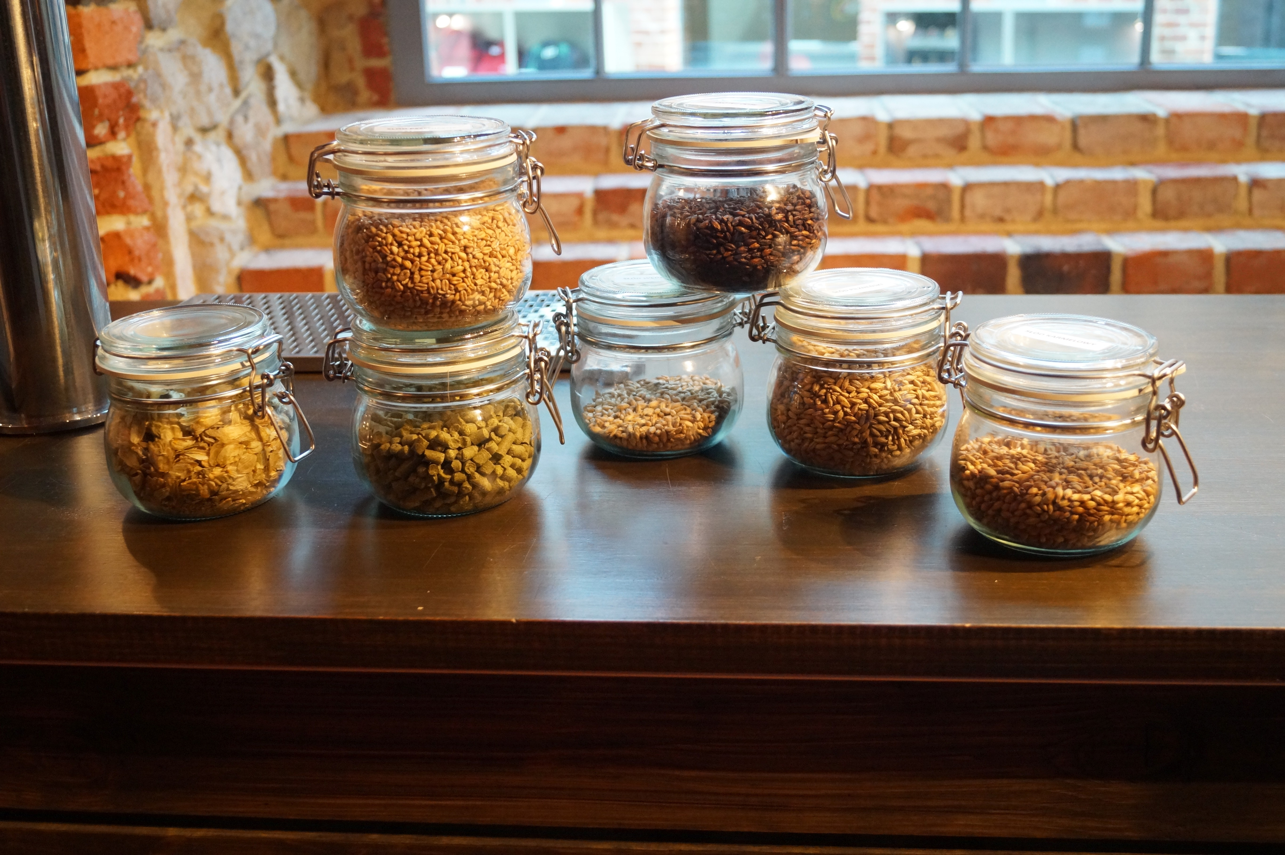 This photo was taken during Automotive Wikiexpedition 2016 set up by Wikimedia Polska Association. You can see all photographs in category Wikiekspedycja motoryzacyjna 2016. English | Polski | +/− Składniki piwa - różne rodzaje słodów i granulowany chmiel w Browarium Tychy